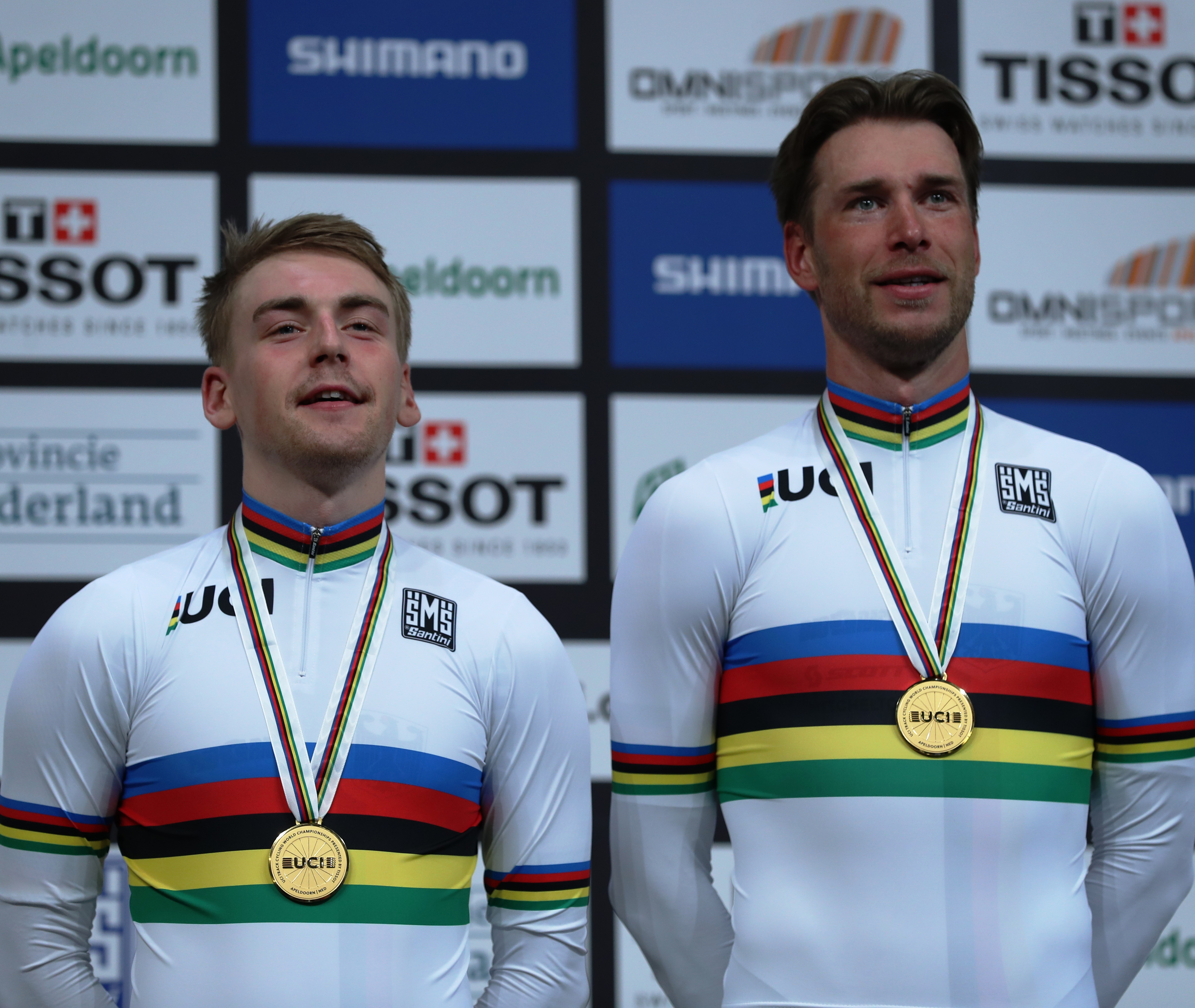 Theo Reinhard (l.) und Roger Kluge, Weltmeister im Zweier-Mannschaftsfahren 2018